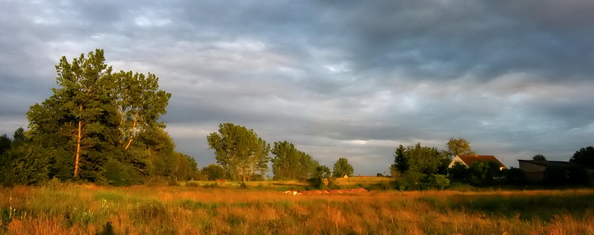 Osina - krajobraz